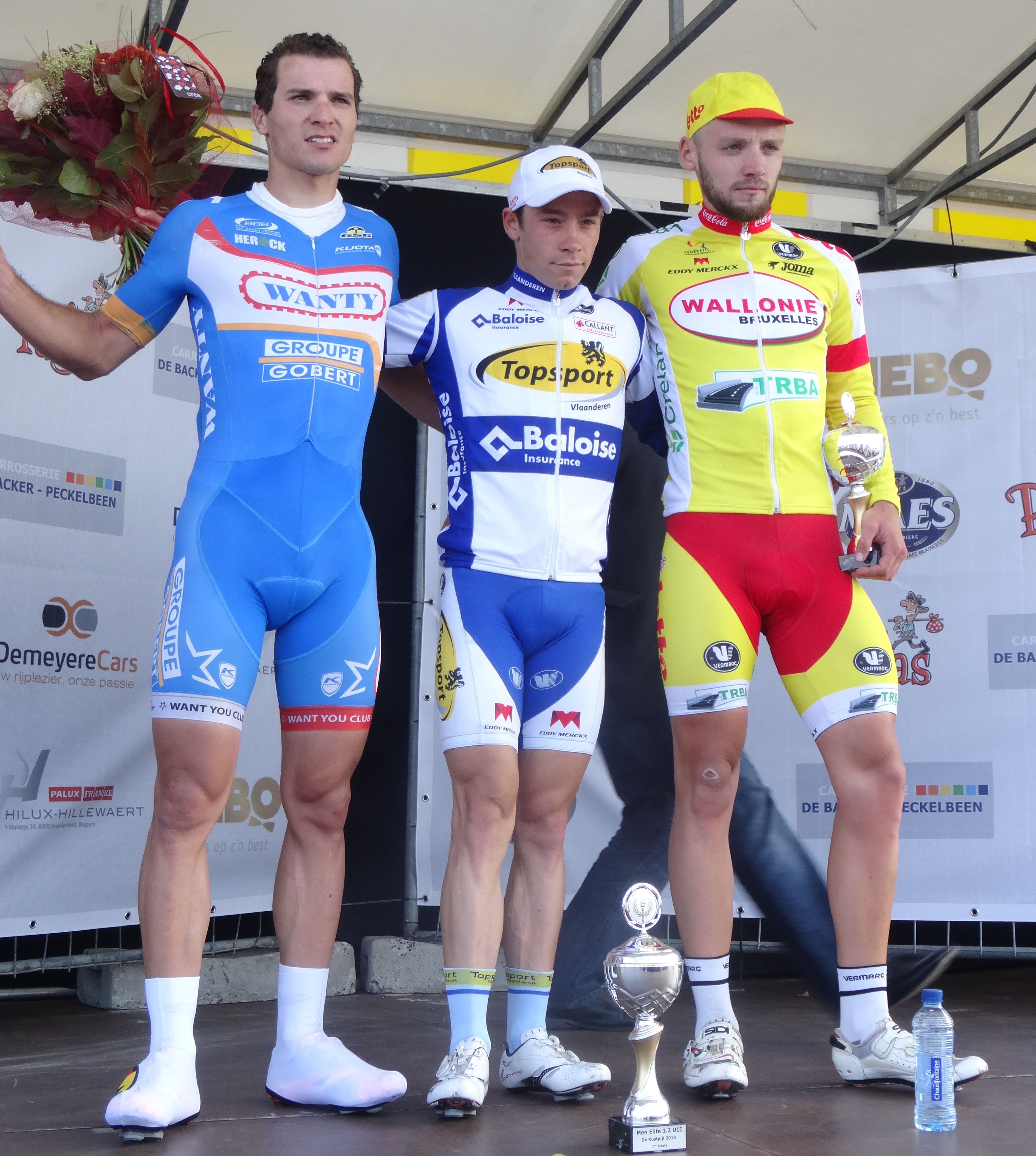 Reportage photographique réalisé le samedi 13 septembre à l'occasion du départ et de l'arrivée de la Flèche côtière 2014 à Heist (Knokke-Heist), Belgique.